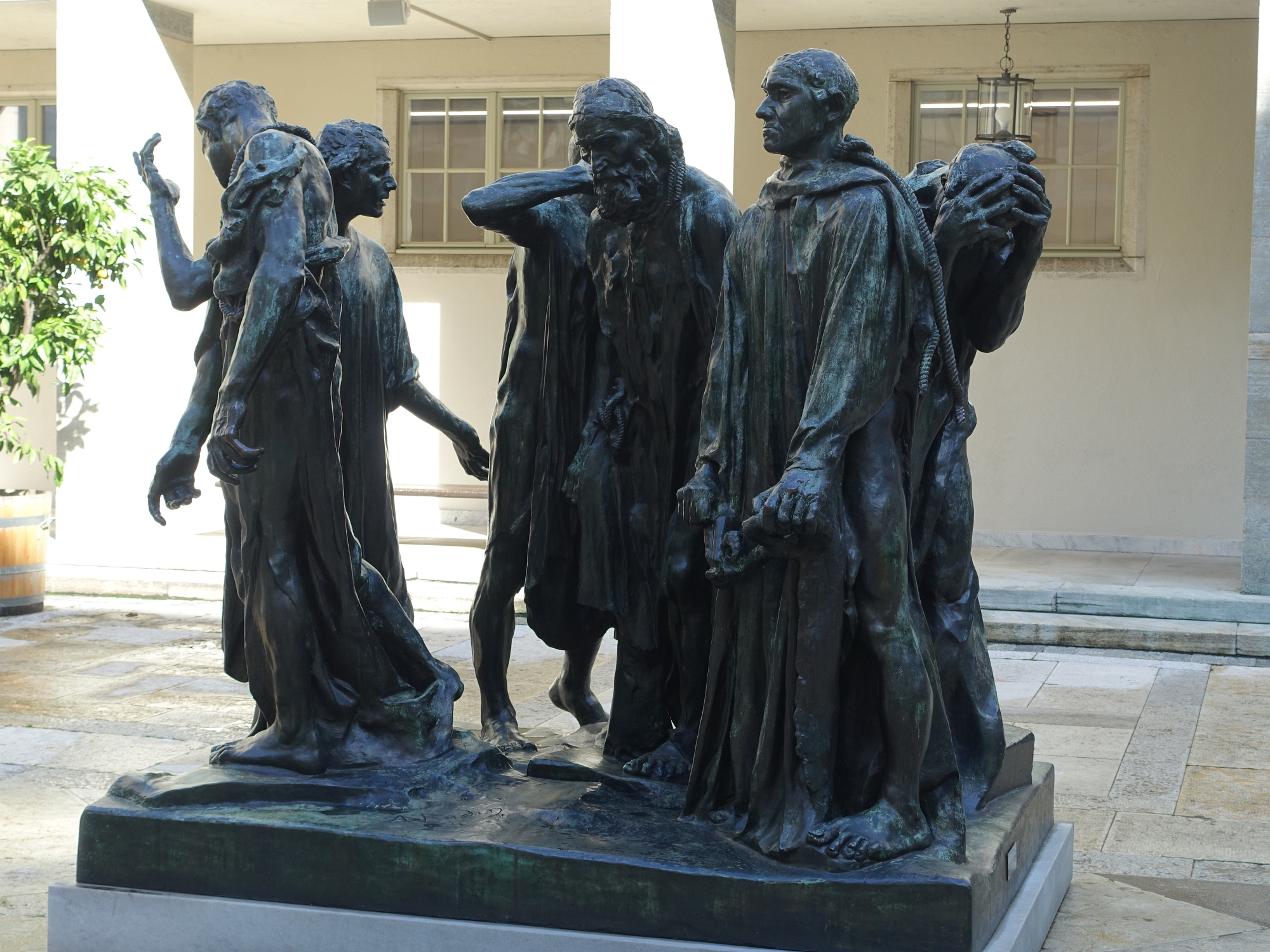 Kunstmuseum Basel. Skulptur-Gruppe Les Bourgeois de Calais (1884–1889) von August Rodin (1840–1917)